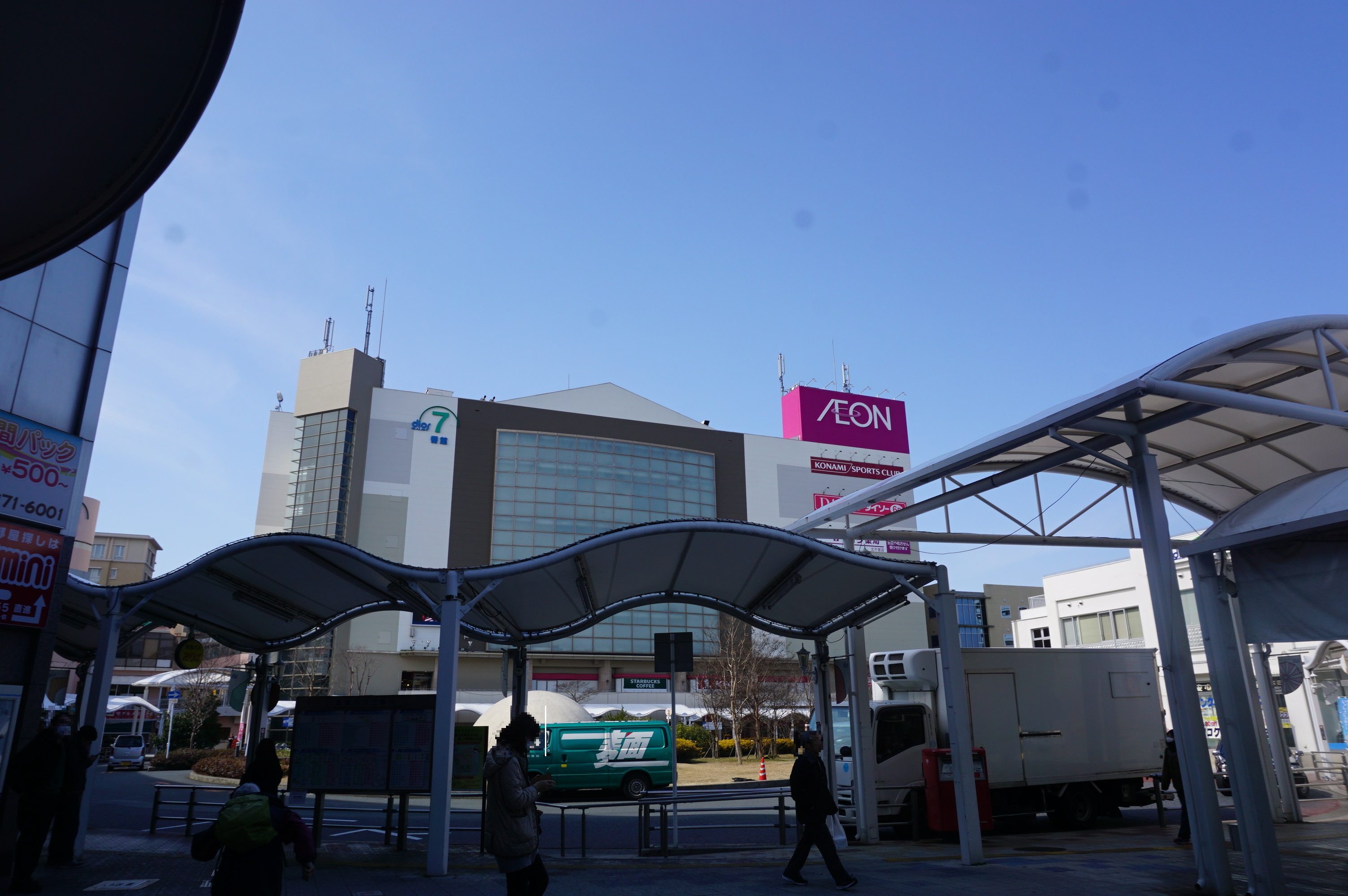 イオン北千里店